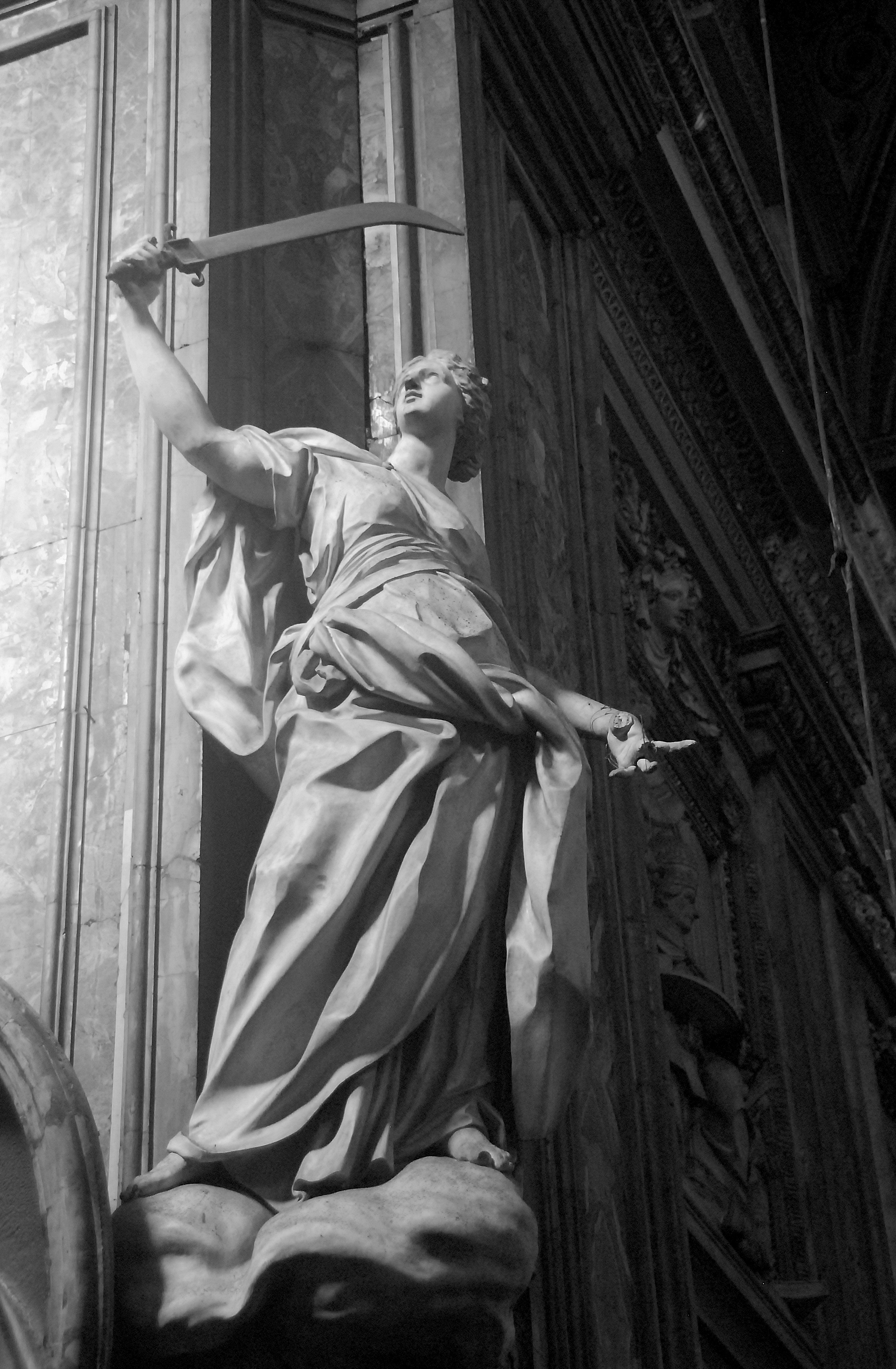 Palermo, ITA